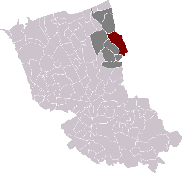 Locatie gemeente Hondschote in arrondissement Duinkerke. Zelfgemaakt. Location of Hondschoote municipality in the arrondissement of Dunkirk. Self made. Localisation de la commune d'Hondschoote dans l'arrondissement de Dunkerque. Fait moi-même.